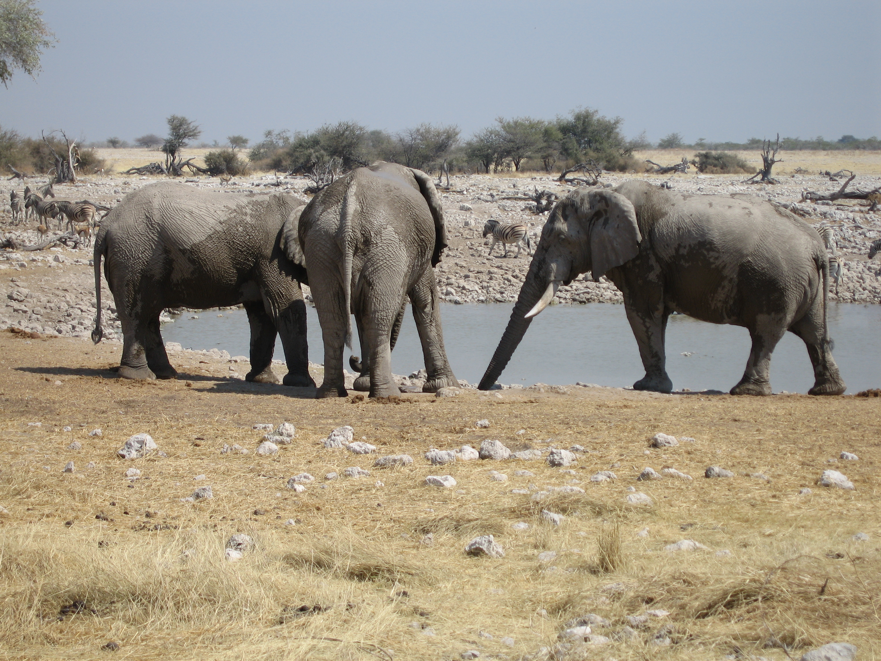 Elefamtes en Okakuejo, Etosha